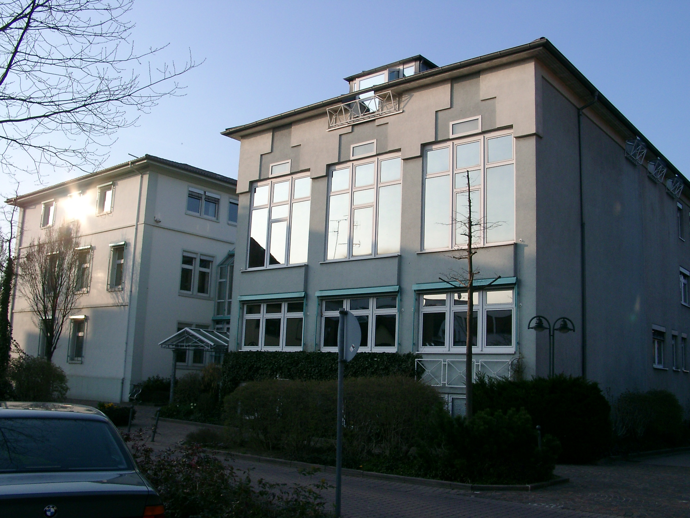 Sinsheim, Rathaus